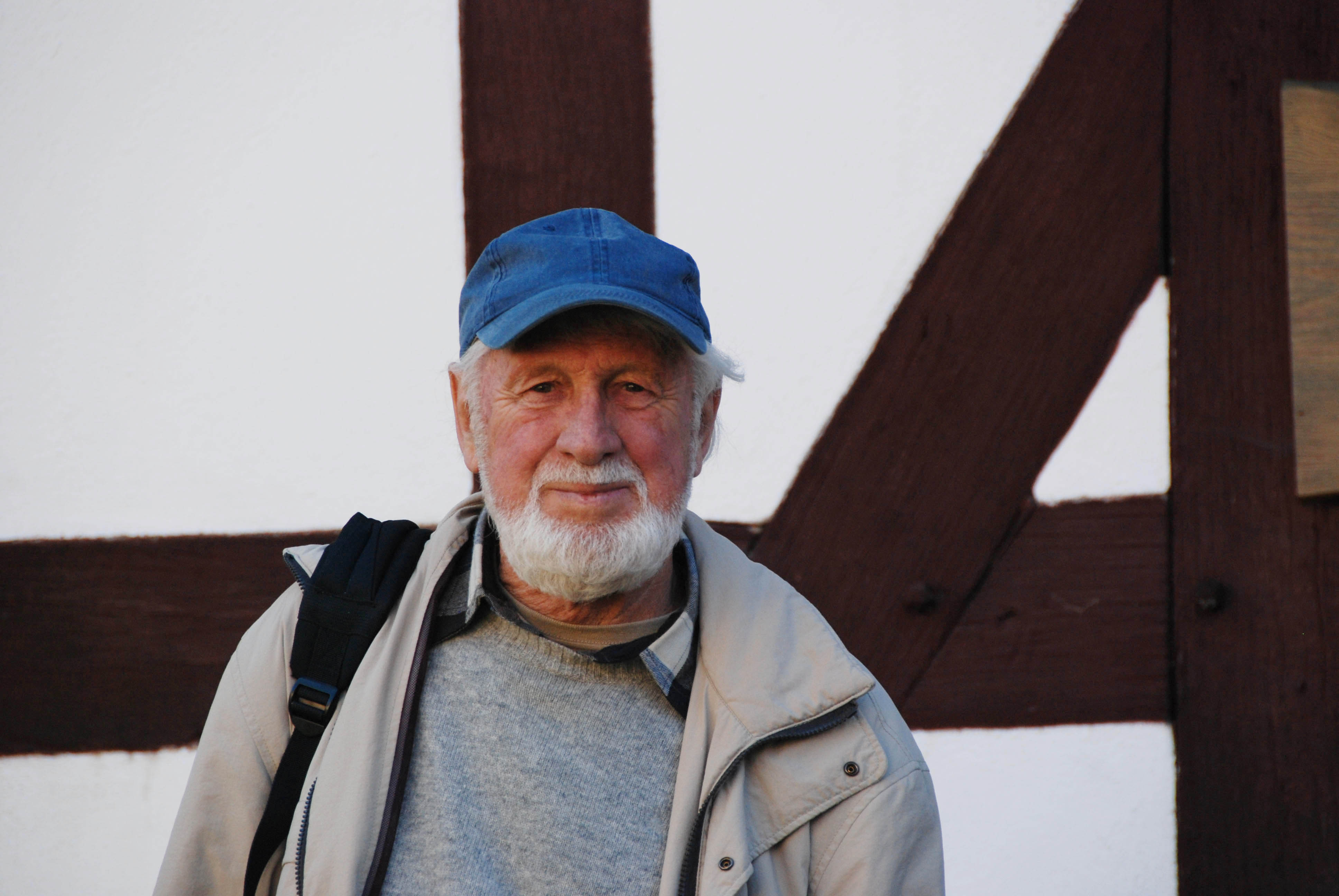 Porträt